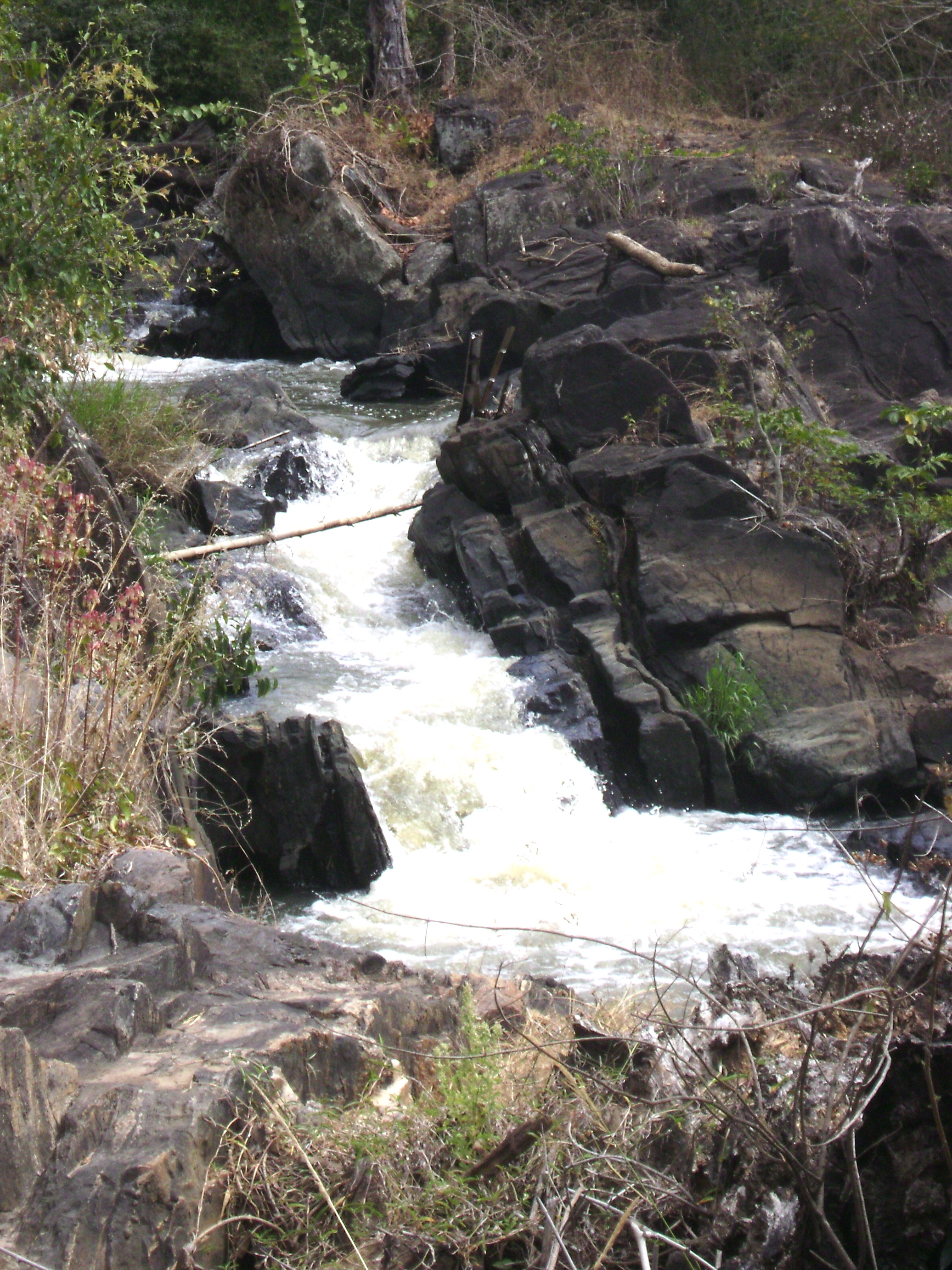 Moyer River at Theppakadu, Mudumalai National Park